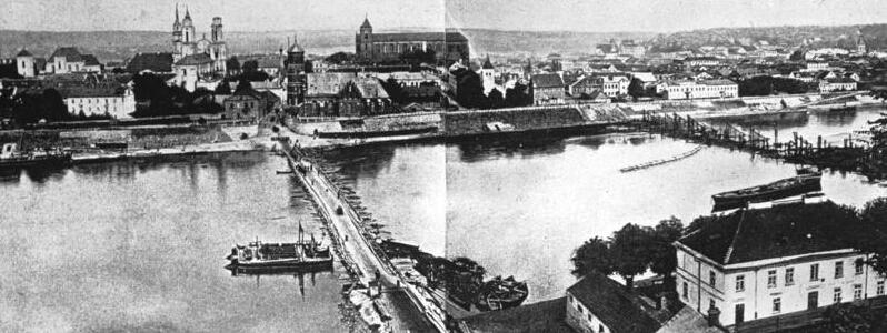 [1. Weltkrieg] Vormarsch in Polen und Rußland Kowno, Gesamtansicht nach der Eroberung.